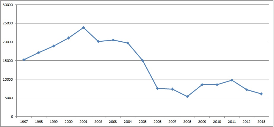 Heitunute arv Eestis 15-74-aastaste vanuserühmas 1997-2013. aastal. Statistikaameti andmed